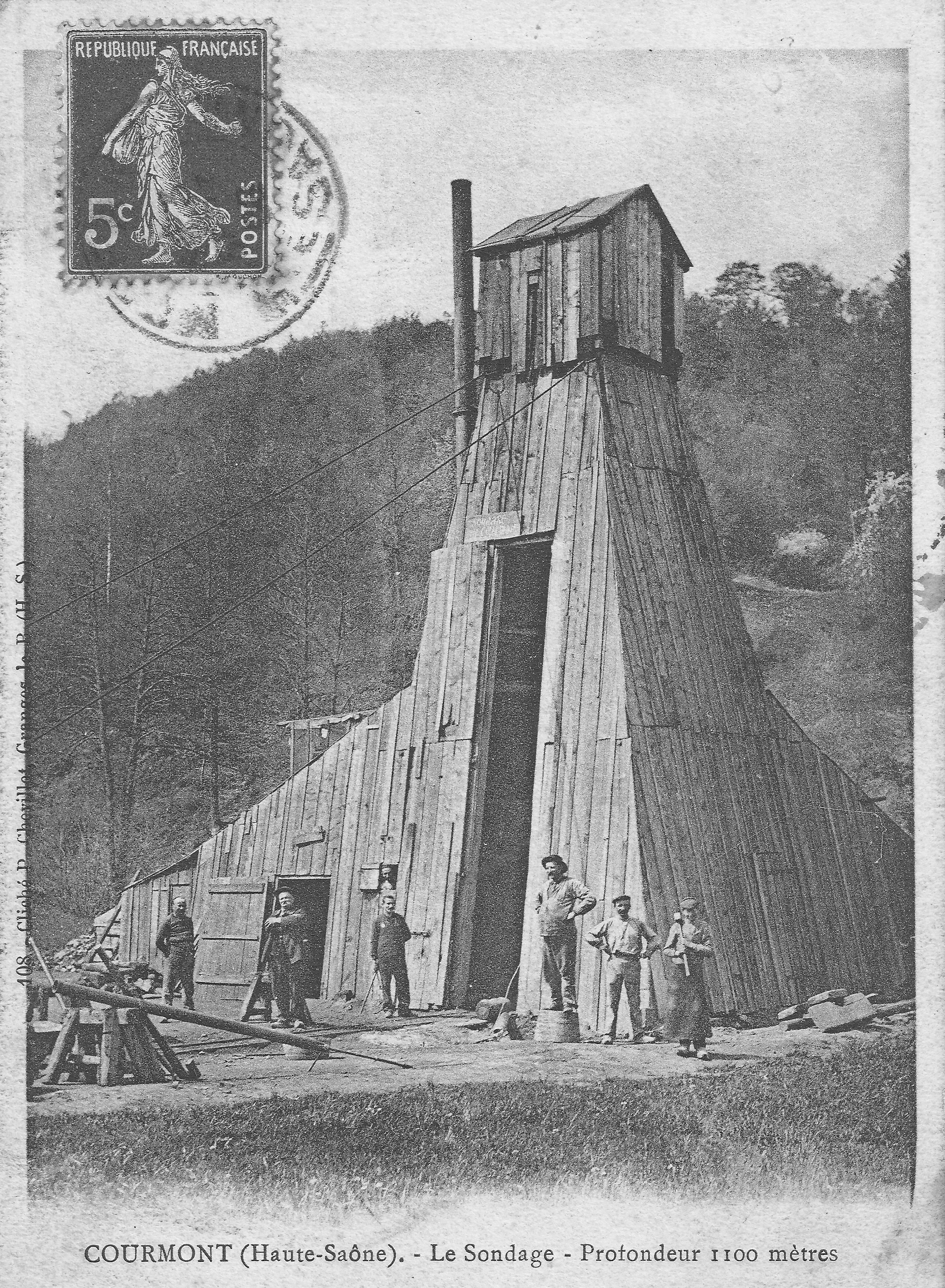 Le Sondage de Courmont entrepris dans la concession de Lomont vers 1904 par la firme Japy.